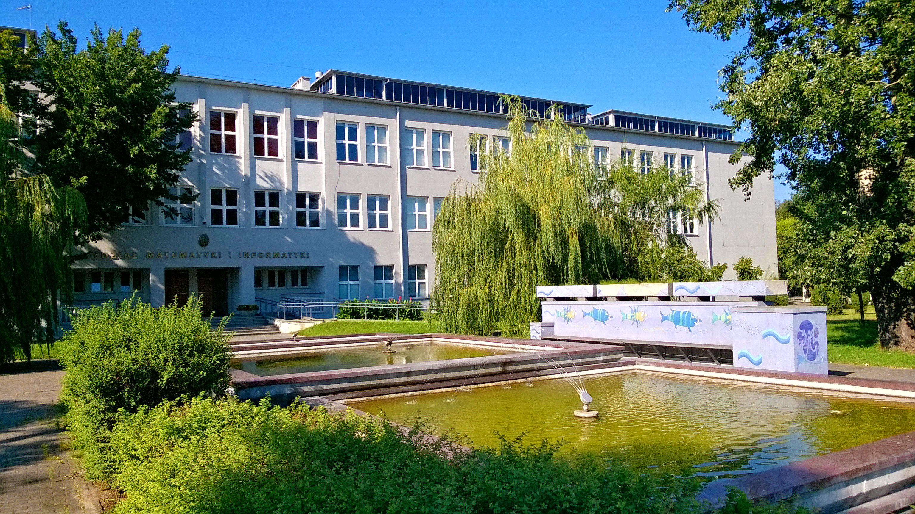 Wydział Matematyki i Informatyki UMK w Toruniu33